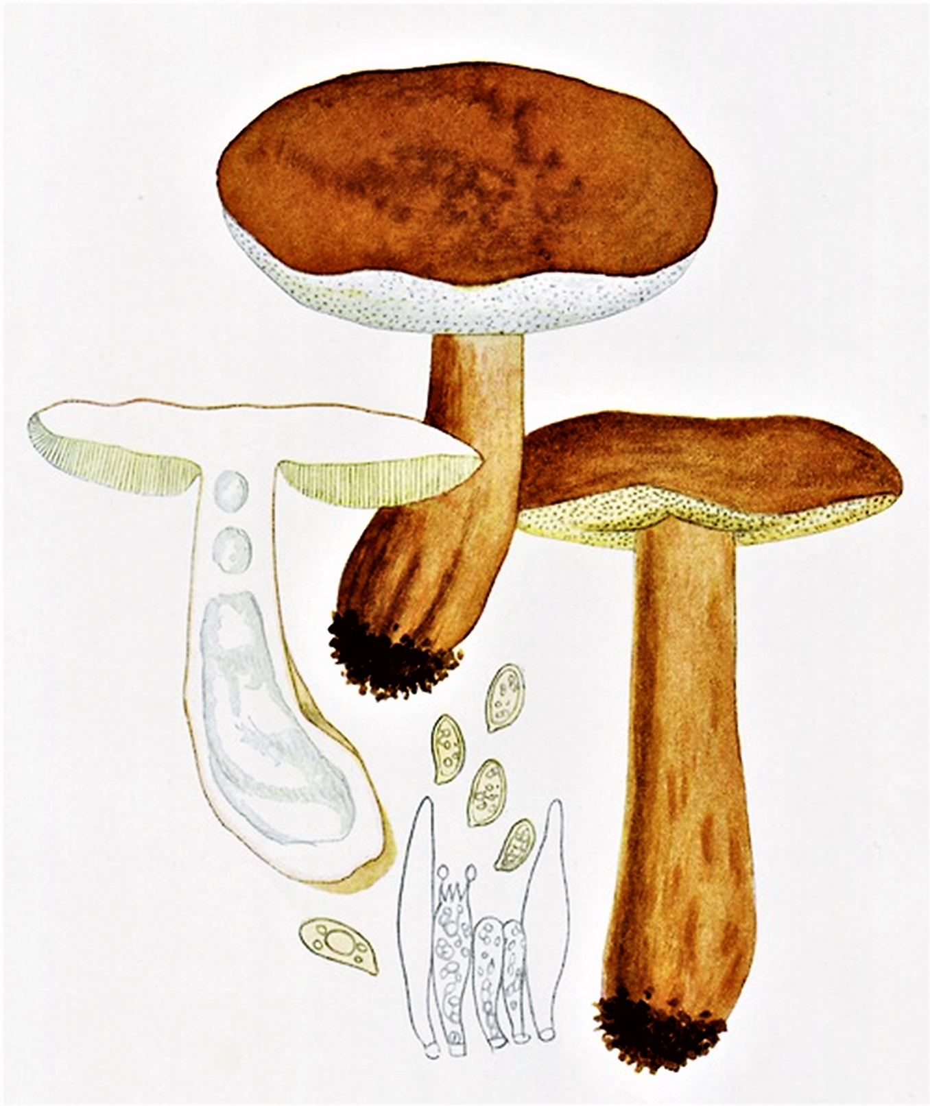 Giacomo Bresadola: Boletus castaneus Bull. (1788), heute Gyroporus castaneus (Bull.) Quél. (1886)